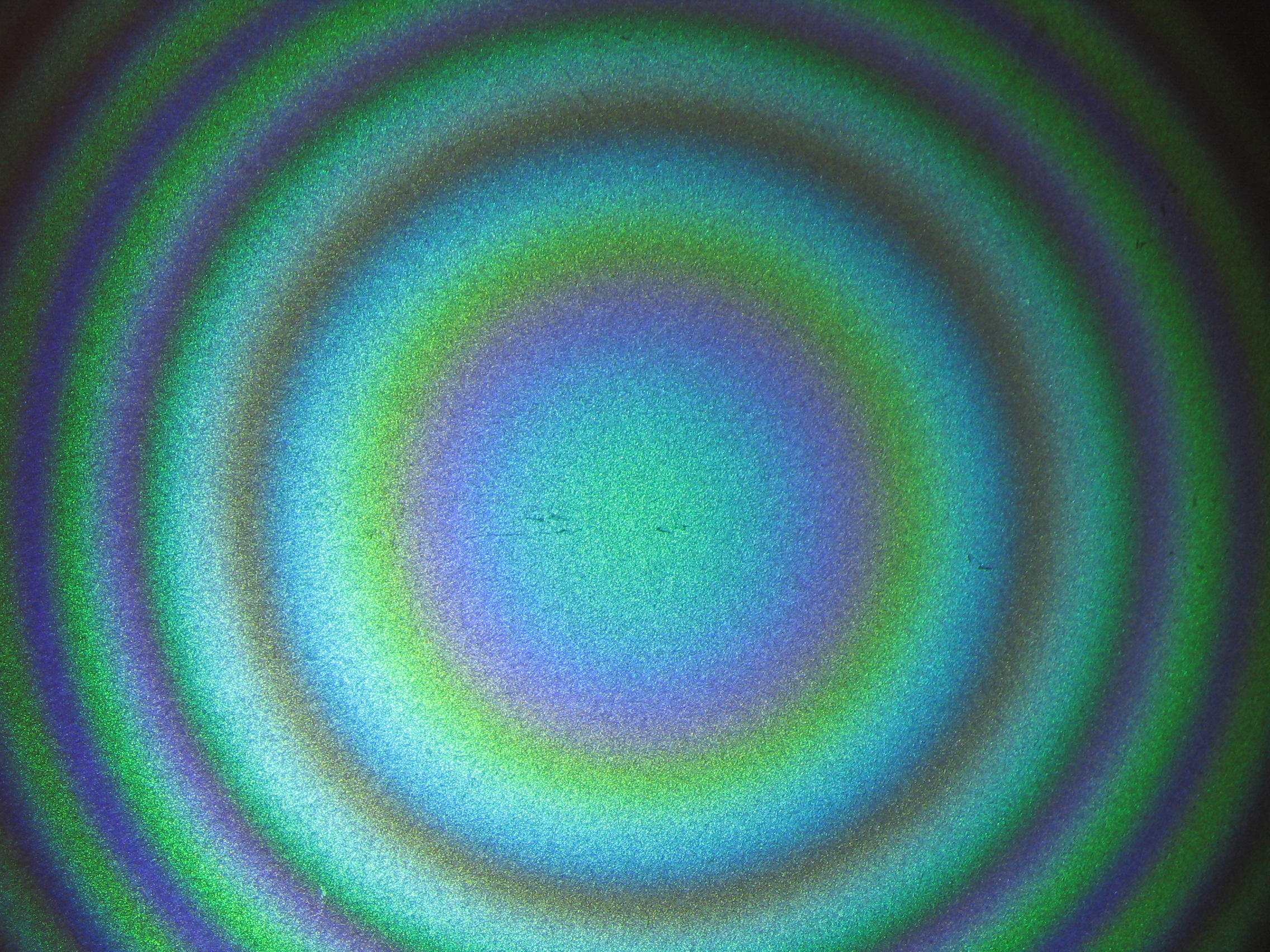 interféromètre de Michelson de miroirs parallèles éclairé par une lampe à vapeur de mercure